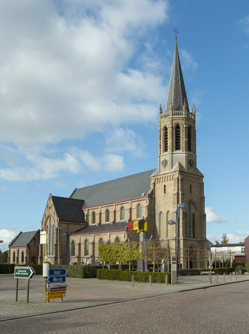 Zandvoorde Churchyard